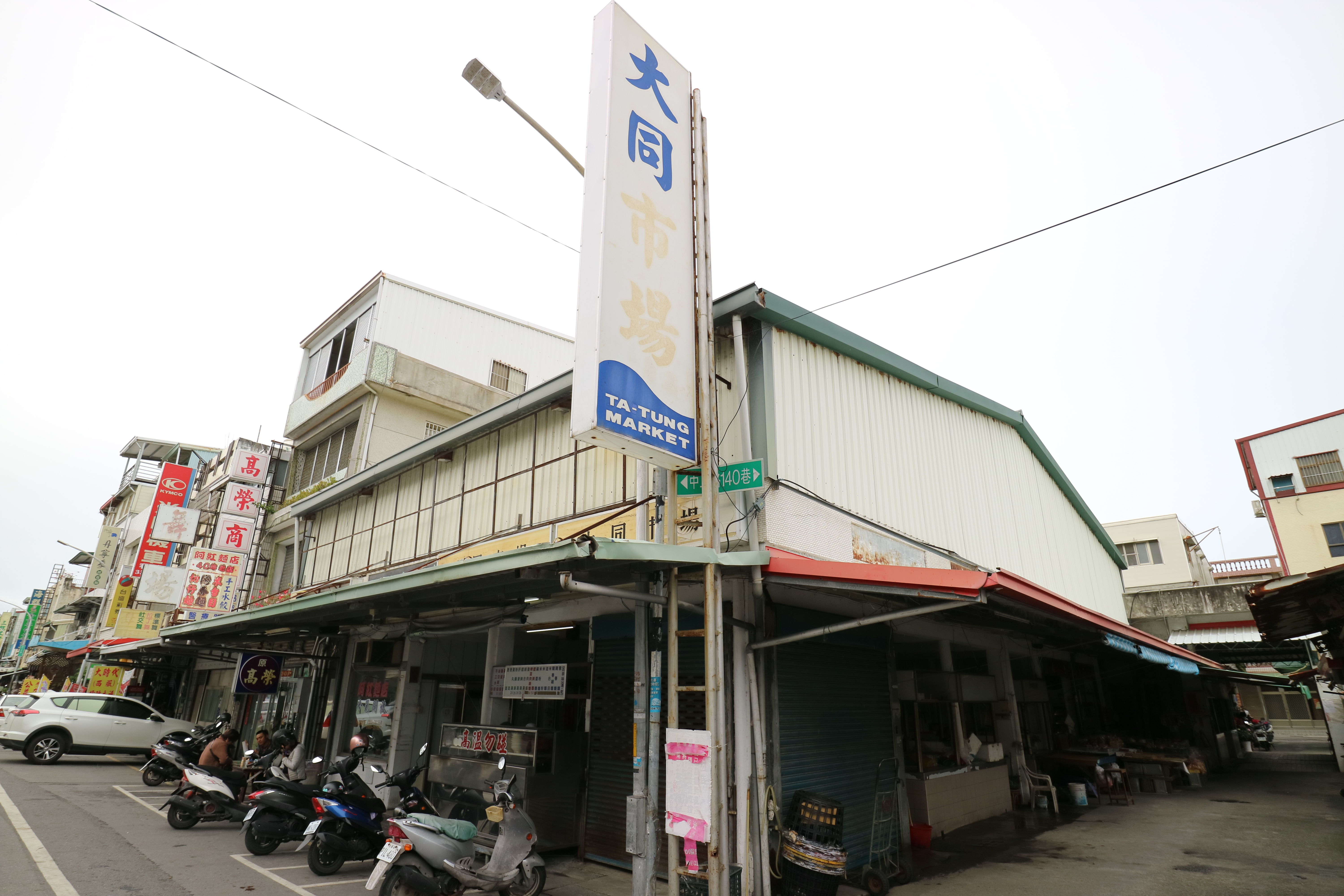 臺東市第二公有零售市場，大同市場外觀